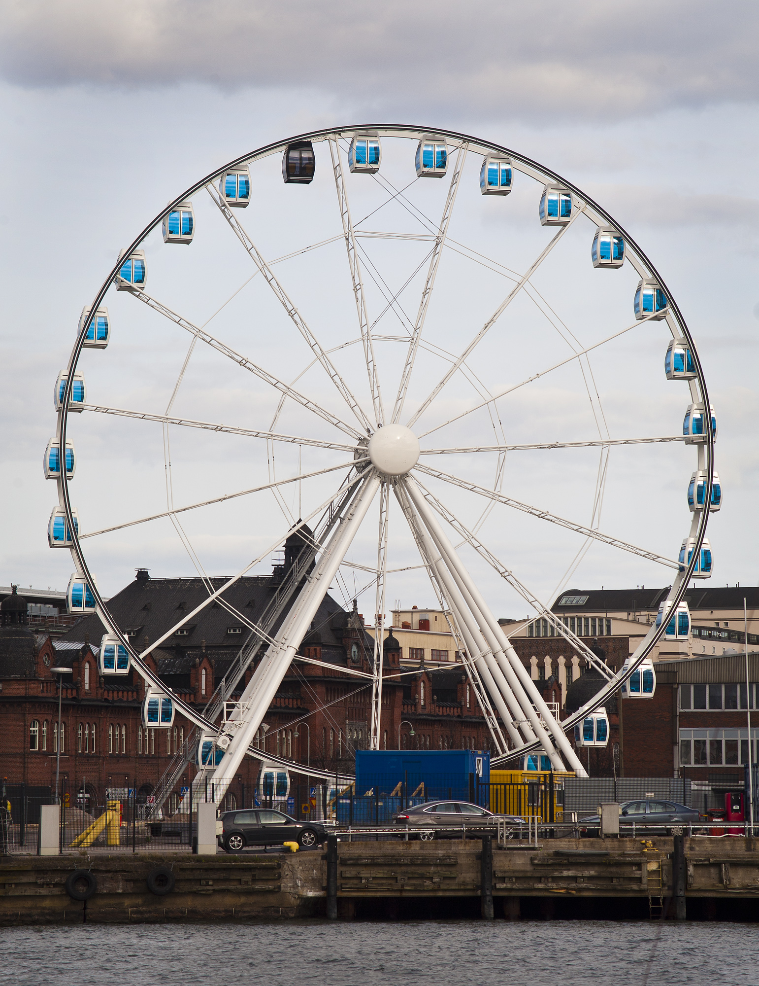 Finnair Sky Wheel Katajanokalla.